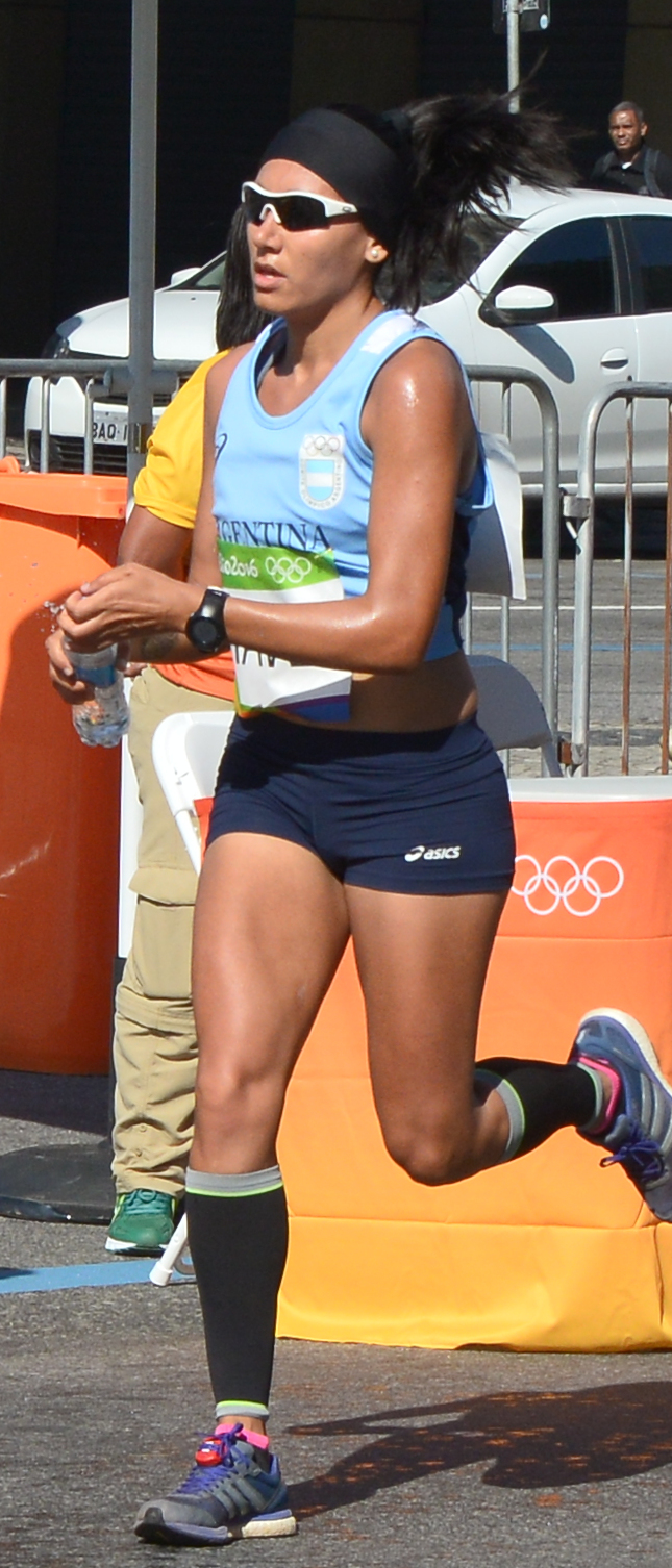 Passage du marathon des jeux olympiques de Rio 2016 dans le centre de Rio